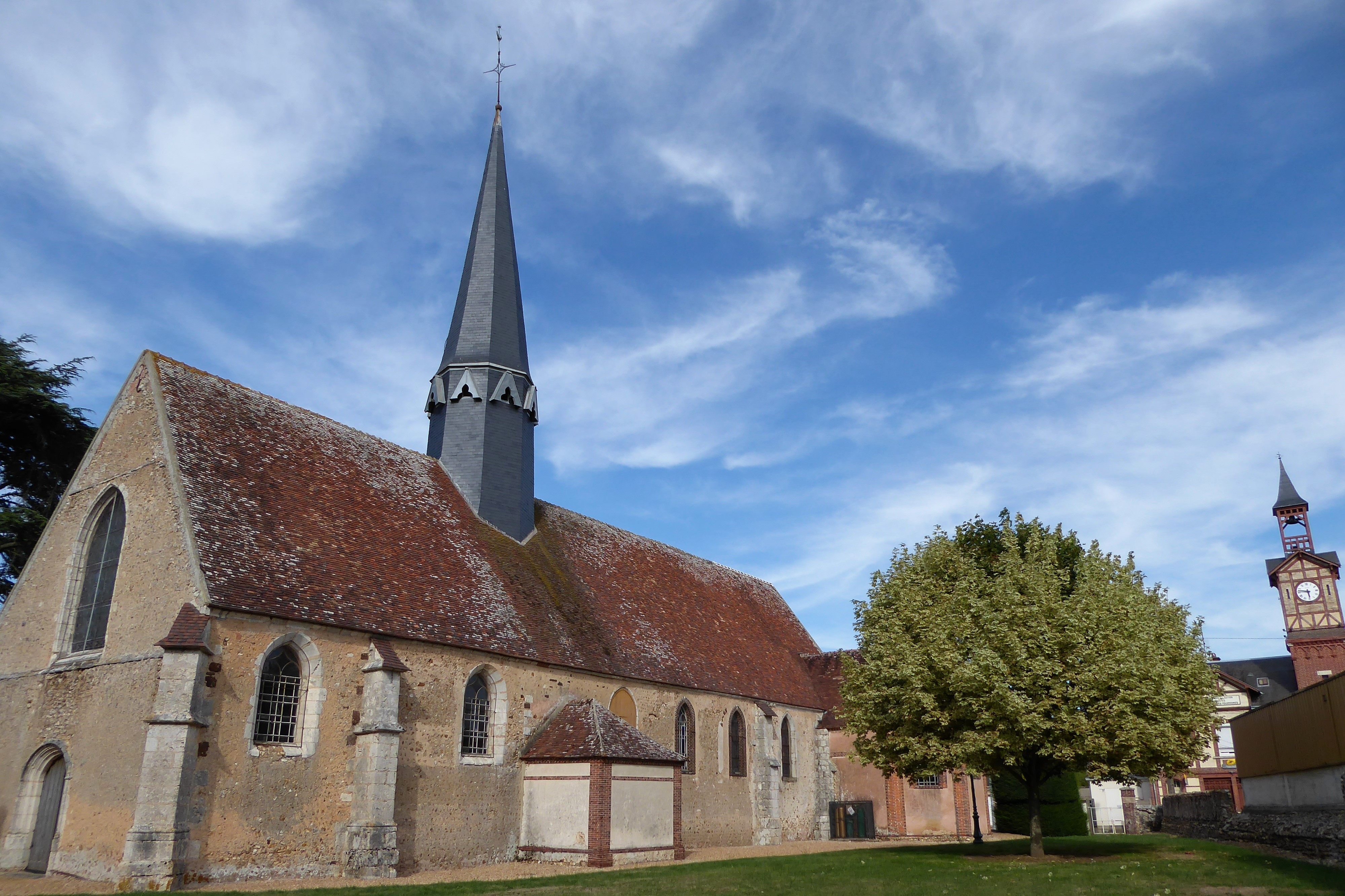 Église Saint-Martin de Fontaine-la-Guyon, Eure-et-Loir, France.